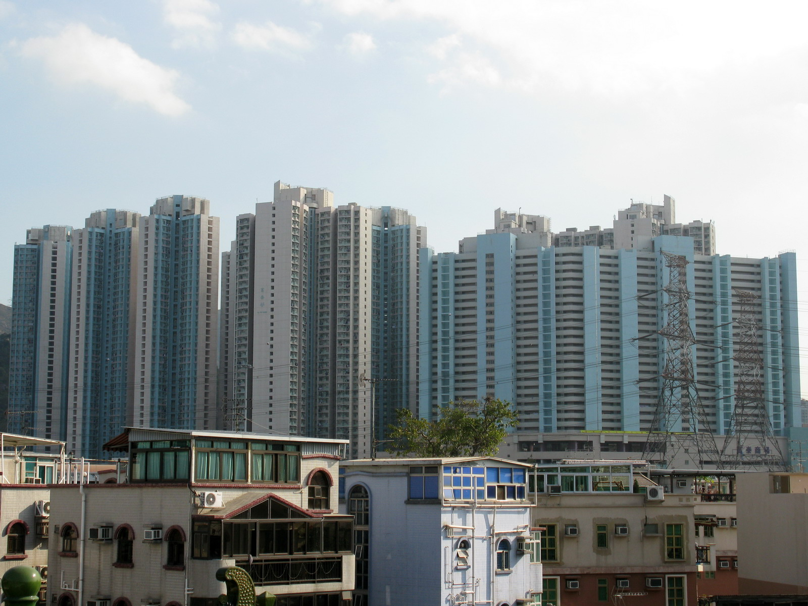 屯門 富泰邨 Fu Tai Estate, Tuen Mun